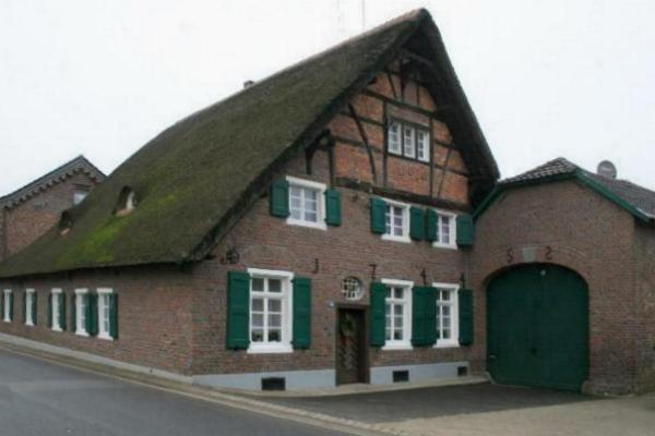 Reetdachhaus Geerkens in Wegberg-Schwaam